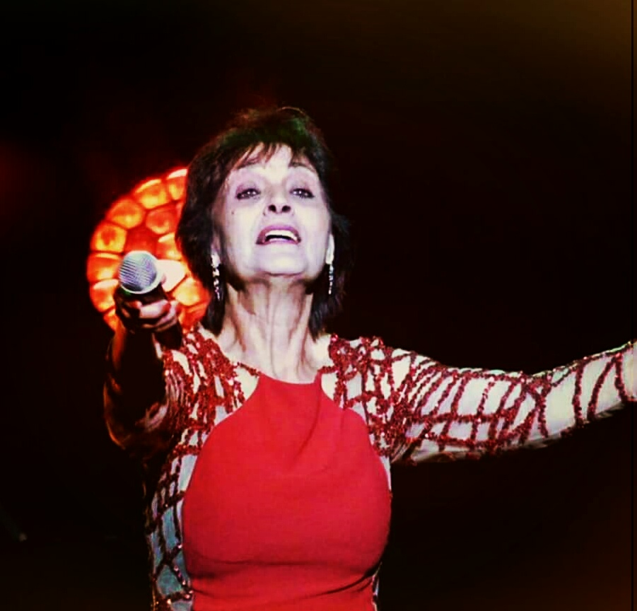 Linda De Suza, sur la scène de la tournée Age Tendre, à Périgueux, le 11 février 2017